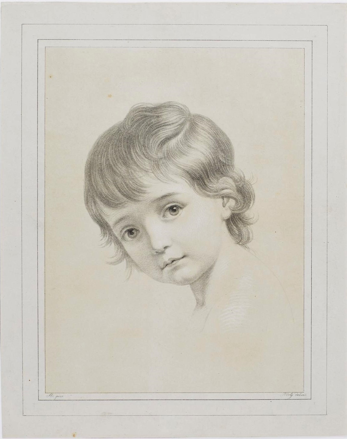 Prinzessin Maximiliane Josephine Caroline von Bayern (1810-1821). Lithographie nach Joseph Stieler 39,6:30,8